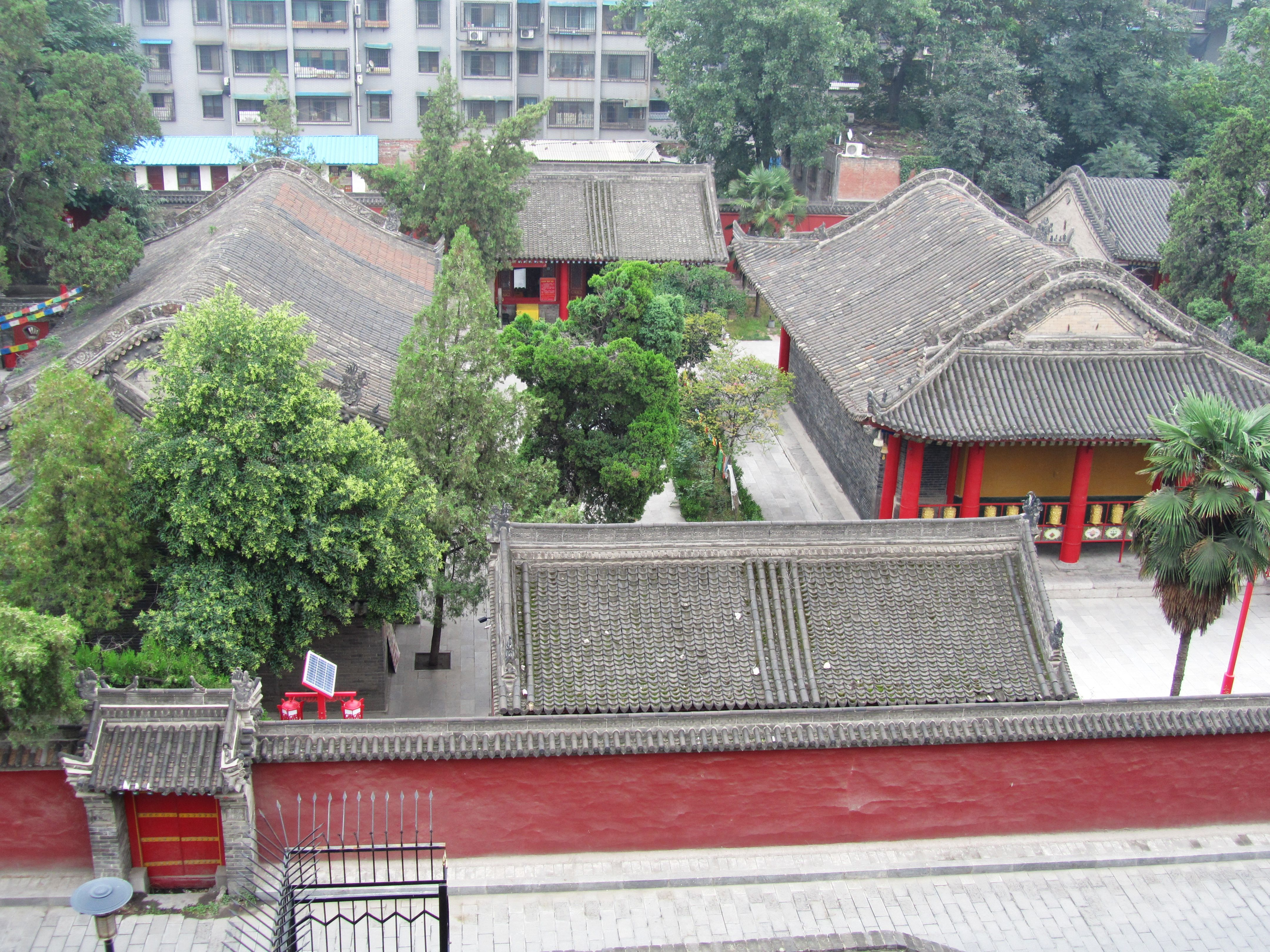 广仁寺，中院，大殿和藏经殿。